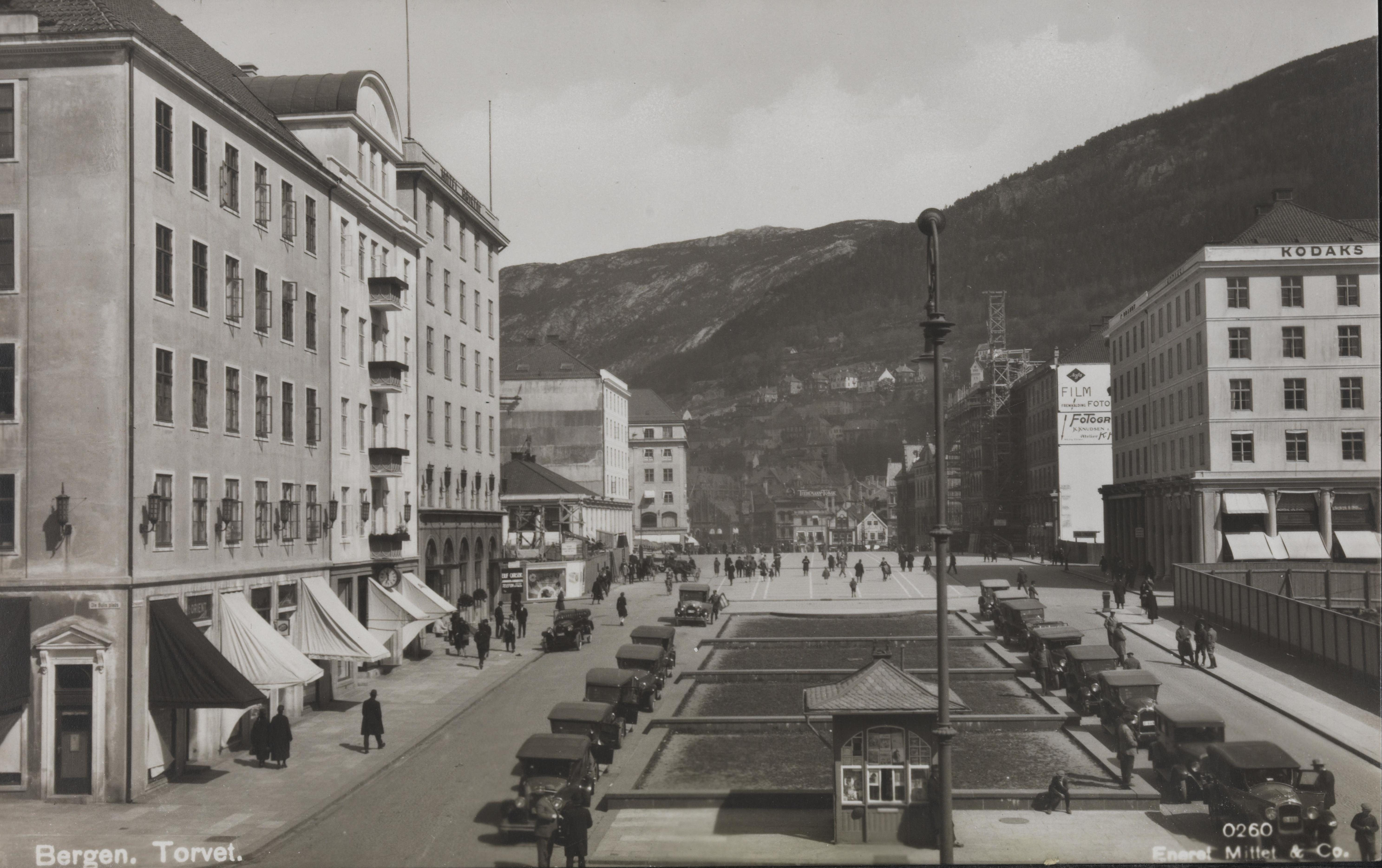 Bildet er hentet fra Nasjonalbibliotekets bildesamling Torget